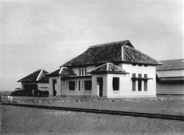 Foto. Kantoor van de Mexolie fabriek te Banjoewangi, Oost-Java.